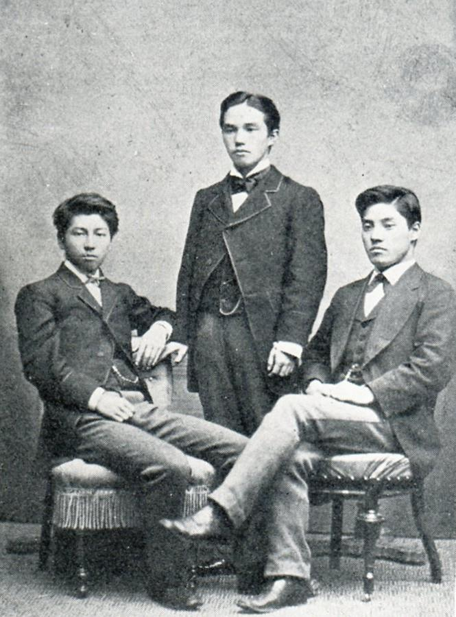 ボストン時代の團琢磨（左）、金子堅太郎（中央）、栗野慎一郎（右）